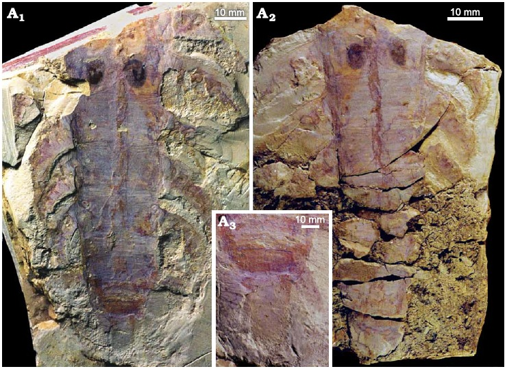 Lower Cambrian xenusiid lobopod Jianshanopodia decora gen. et sp. nov., from Haikou, Kunming, Yunnan, China. A. Holotype ELI−J0007;A1, the part (ELI−J0007A); A2, counterpart (ELI−J0007B), which was unfortunately broken into pieces during preparation; A3, enlargement of the tail fan from A1.